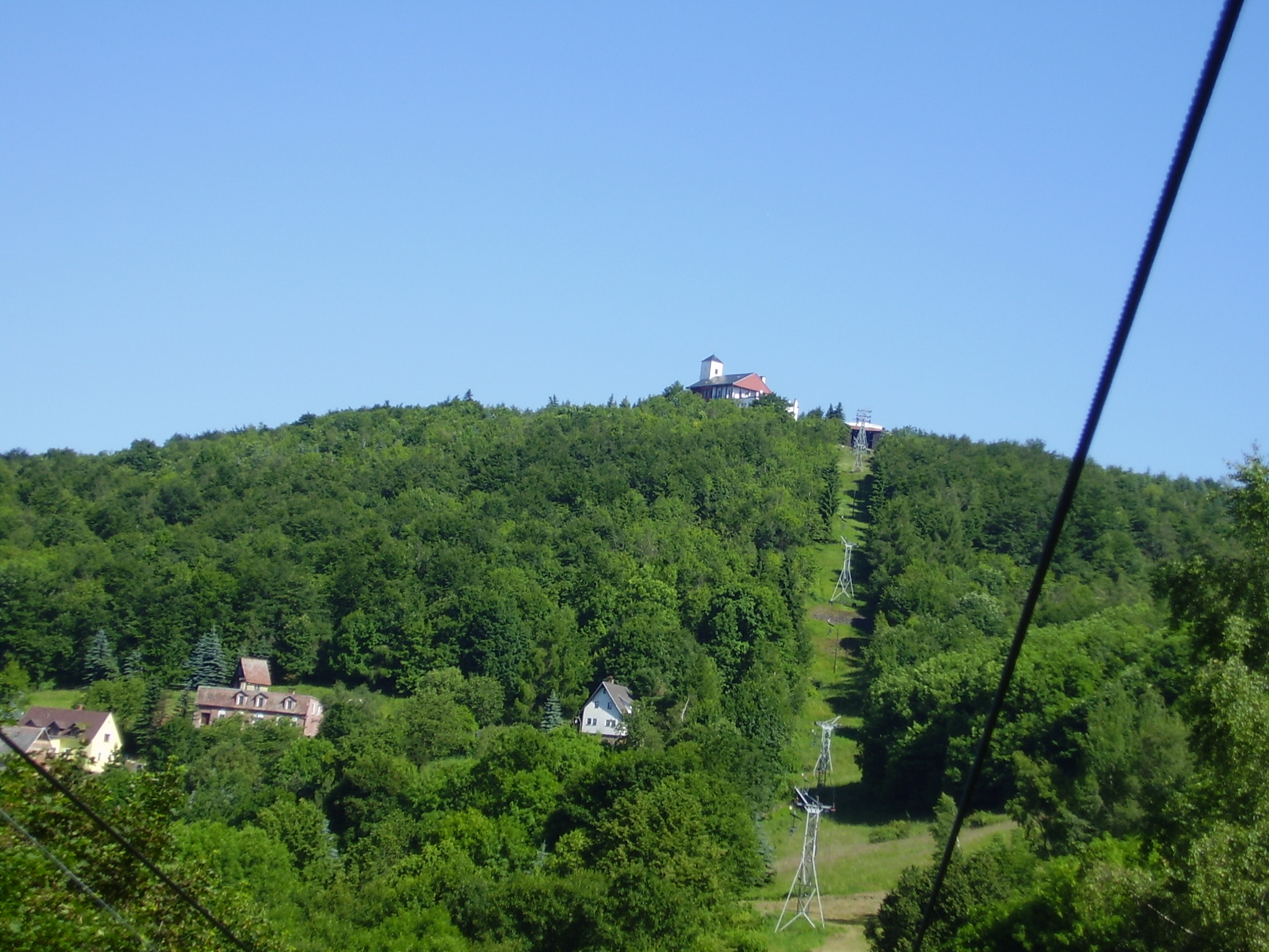 Lanovka na Komáří Vížku